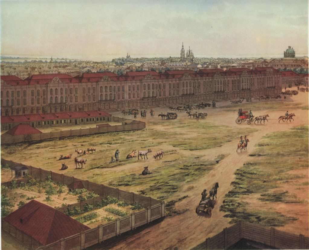 А. Тозелли. Панорама Петербурга. Акварель. 1820. Лист 6. Здание Двенадцати Коллегий.